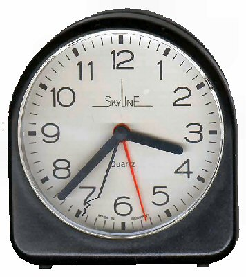 Motiv: Analoger Wecker Abbildung Erstellt von asb Bildspende von: [1]